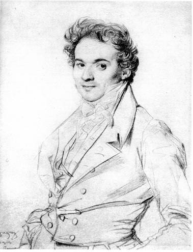 mine de plomb 19 x 15 1818